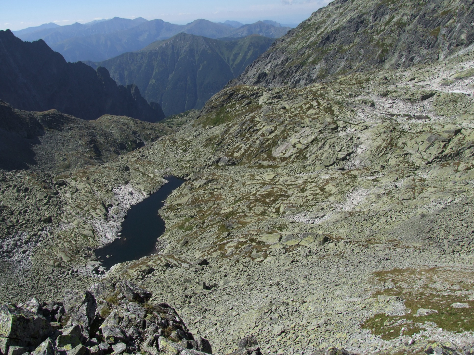 Dolina Niewcyrka (górne piętro) i Wyżni Teriański Staw. Ponad doliną Kopy Liptowskie